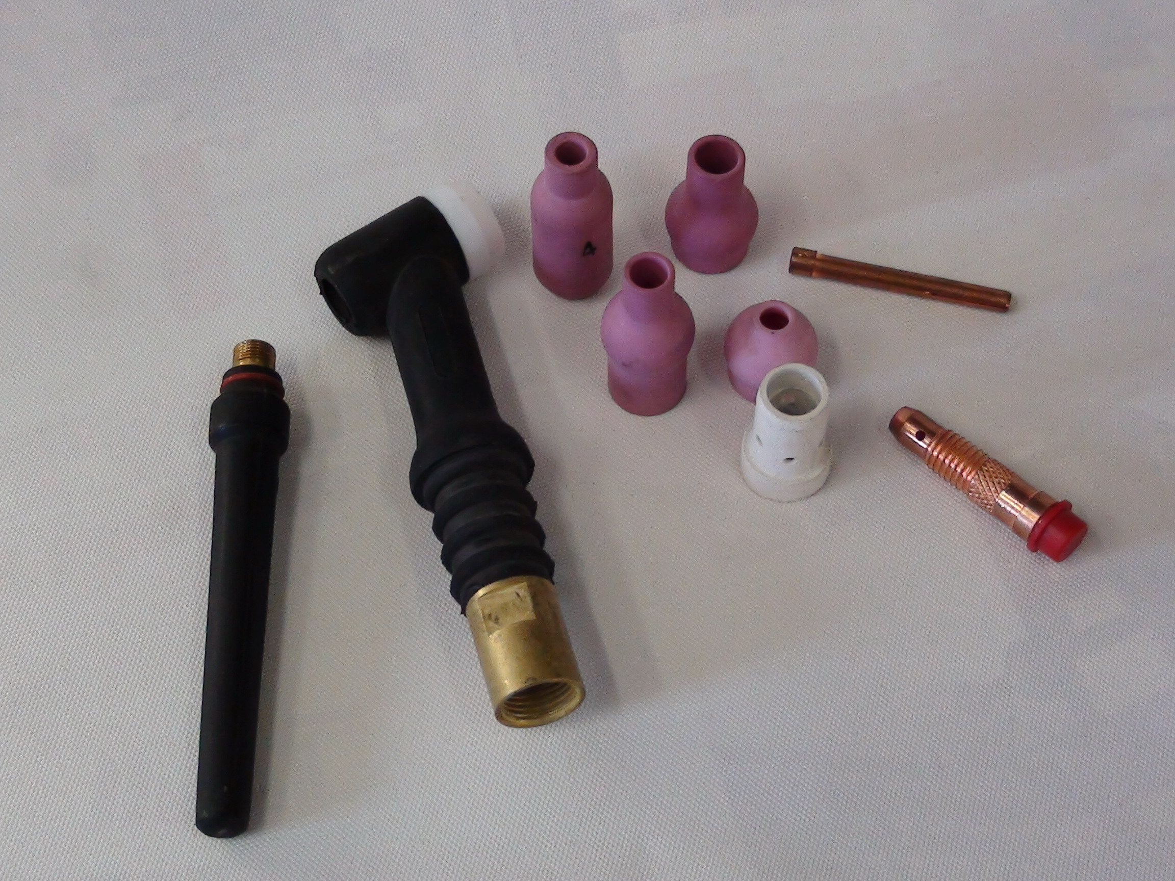 Deli TIG gorilnika.